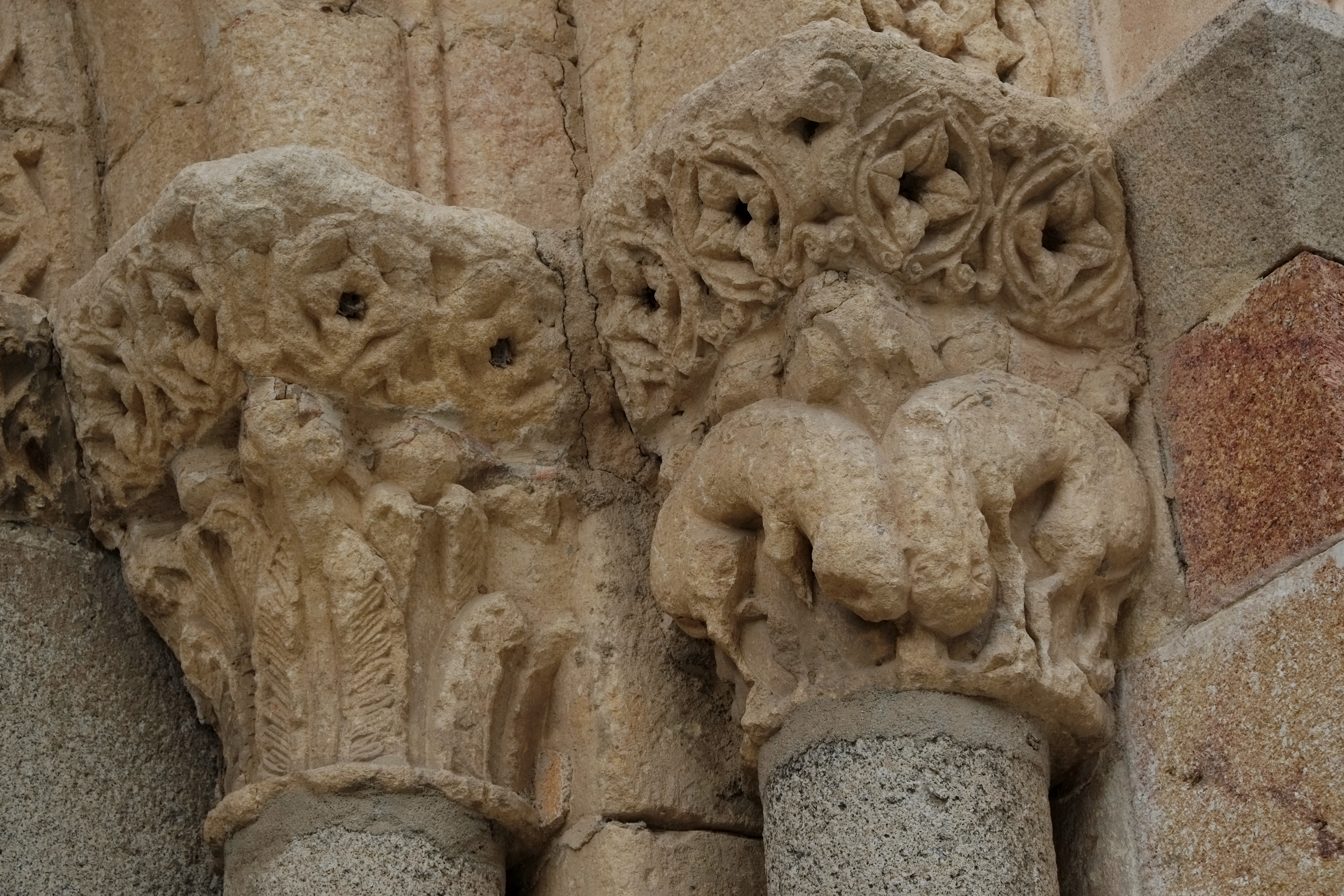 Kirche San Andrés in Ávila (Kastilien-León/Spanien), Kapitelle am Portal